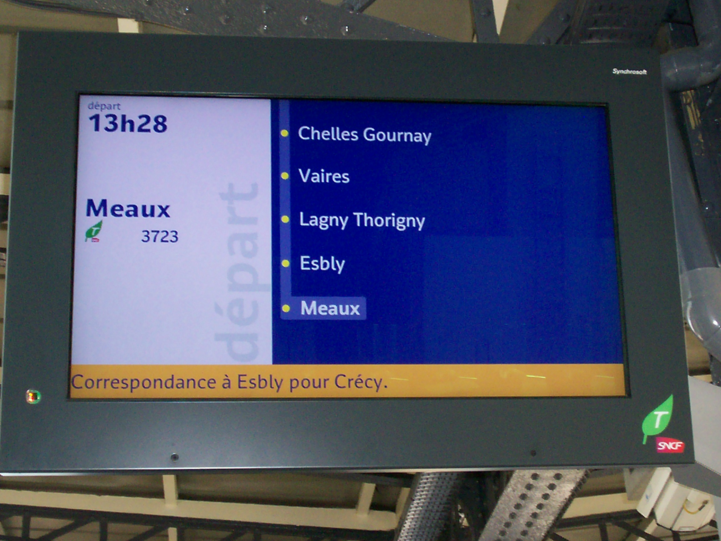 Ecran Infogare nouvelle génération de type LCD à Paris-Est